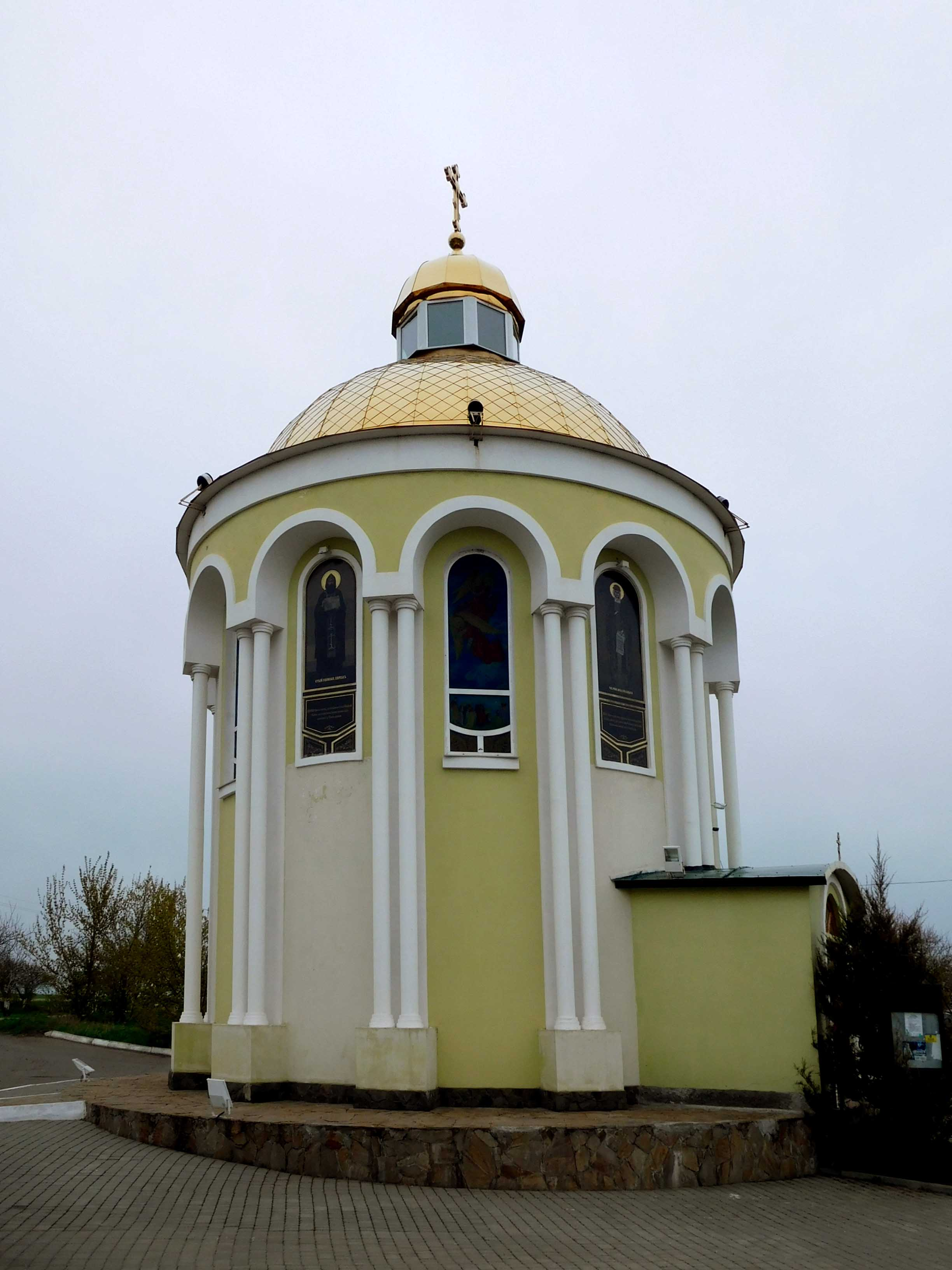 Храм Всіх святих землі Української, смт Доброслав, Одеська область, Україна